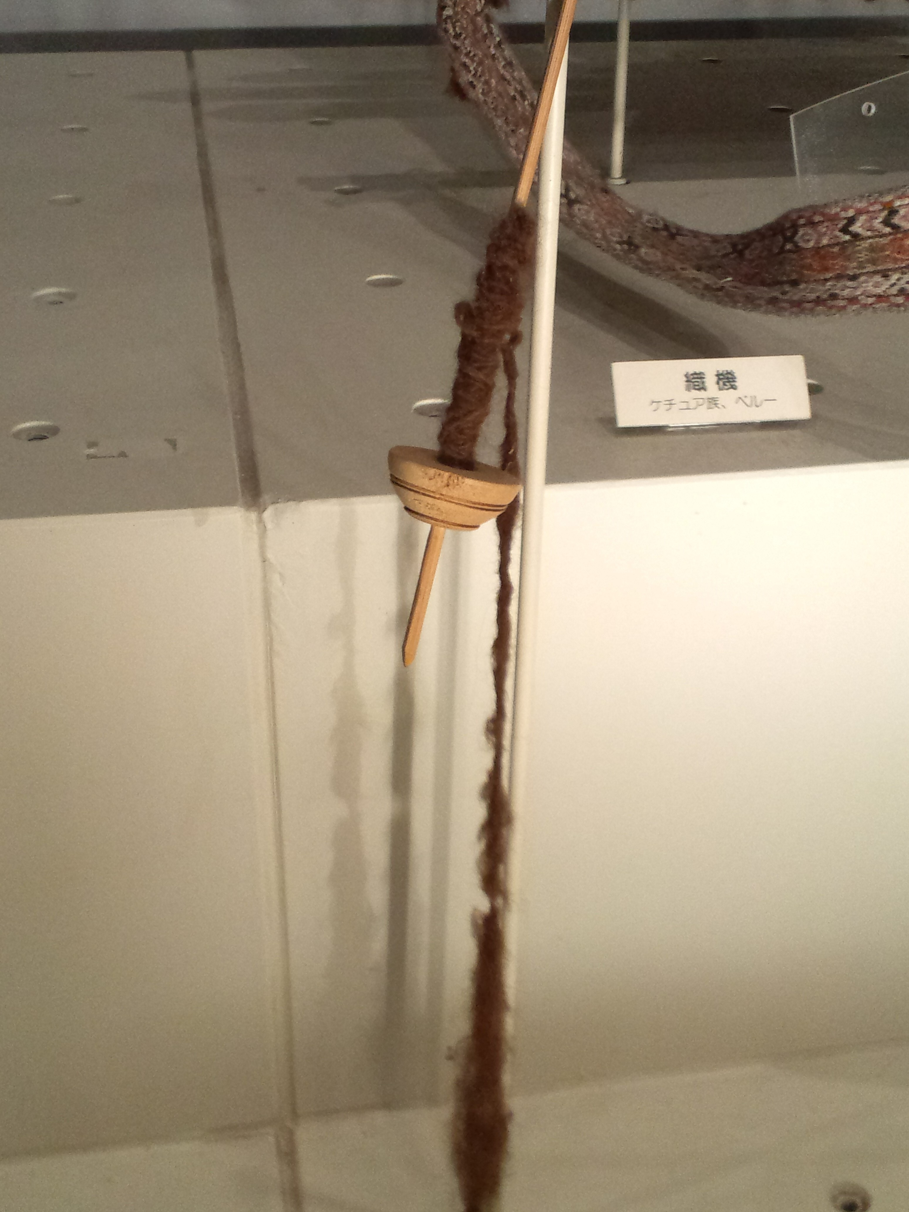 リトルワールド 本館展示室 紡錘車（ペルー、ケチュア族）